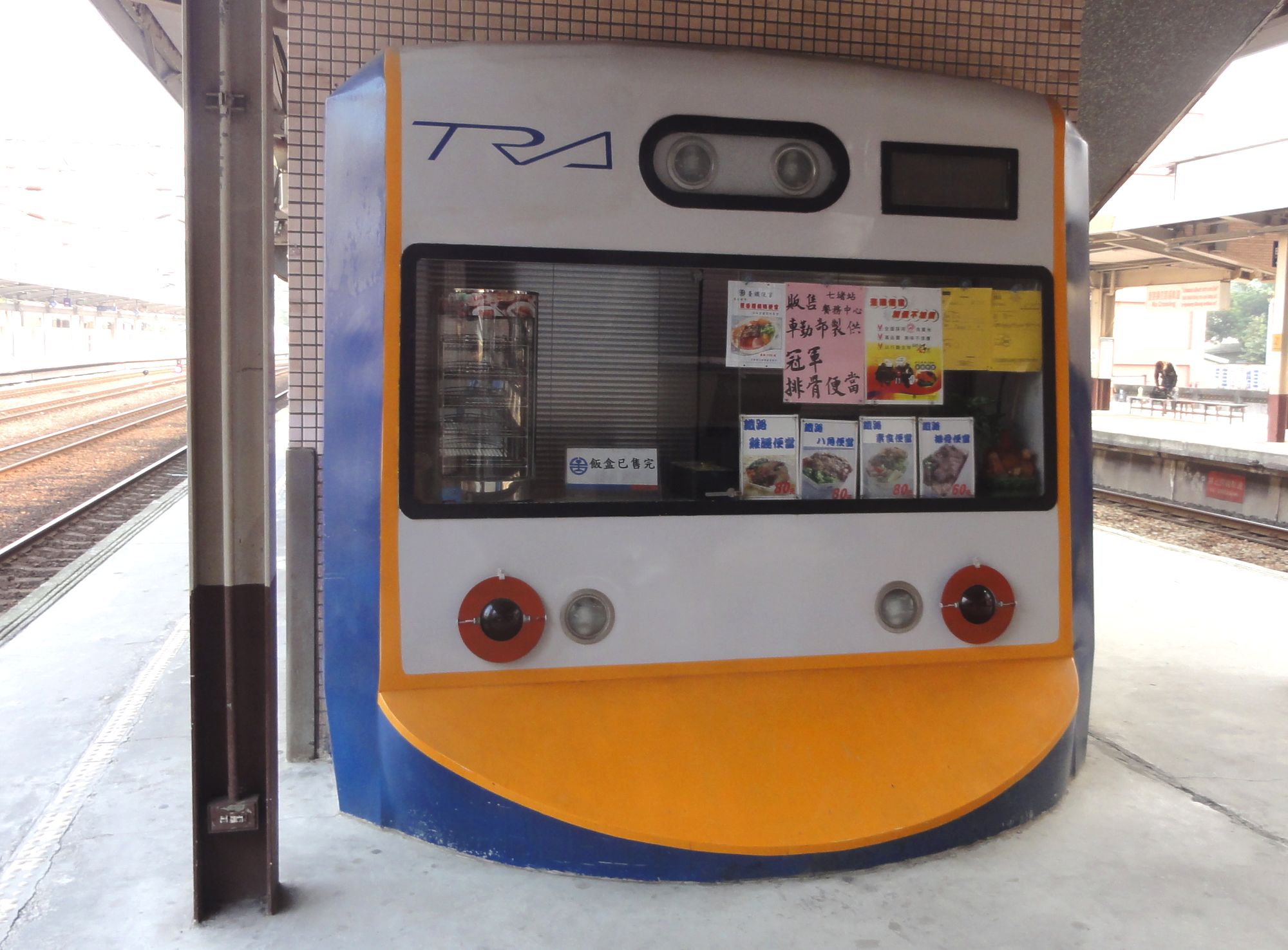 台湾鉄路管理局樹林駅、EMU700型電車の前面をモデルにした弁当販売店。